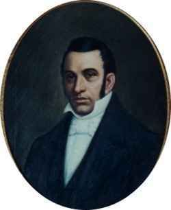 En 1816 fue electo diputado al Congreso de Tucumán, y en tal carácter fue de los que proclamó la Independencia de las Provincias Unidas del Río de la Plata